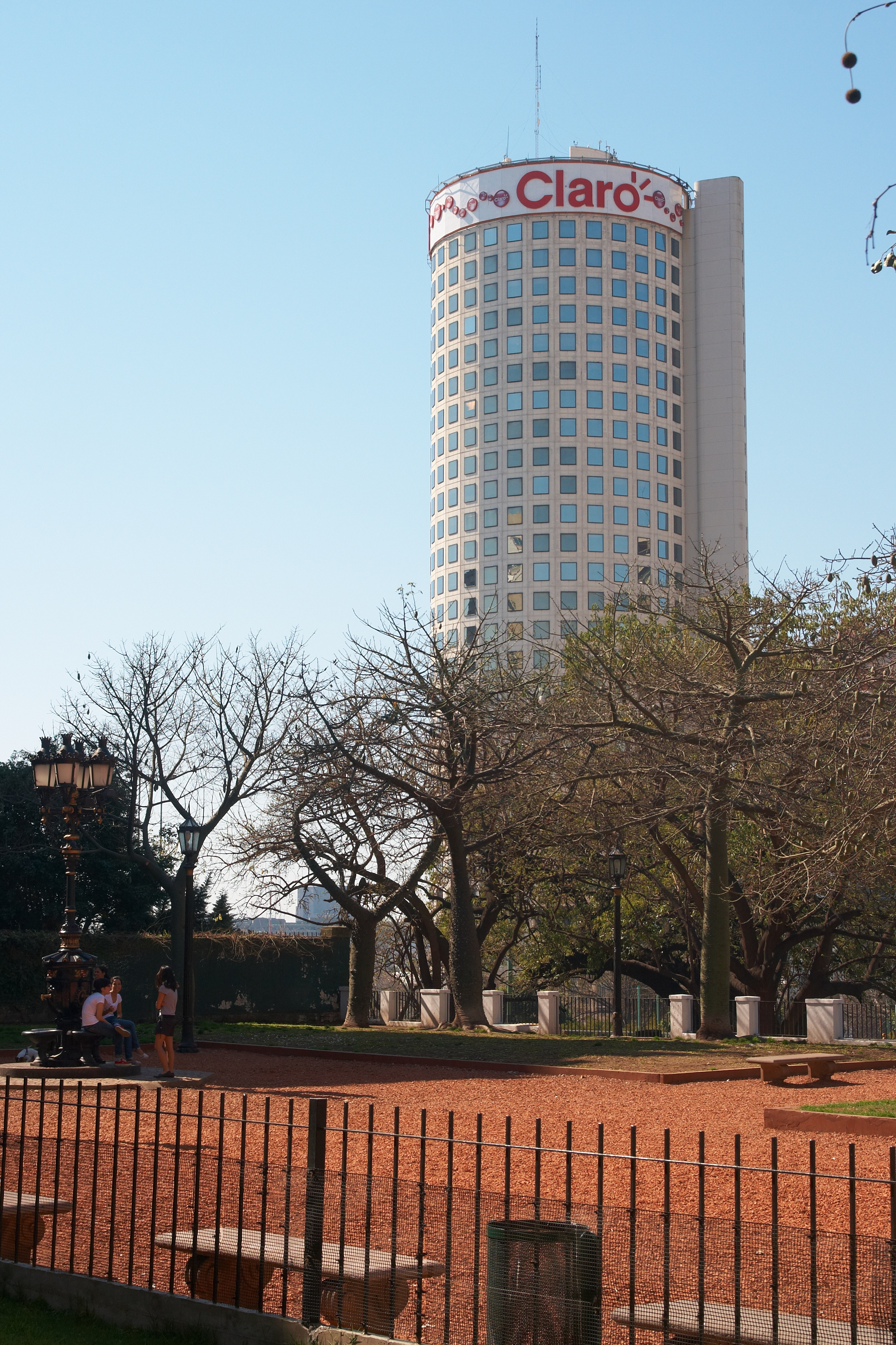 Plaza Cataluña y torre Prourban (el rulero), Retiro, Buenos Aires, Argentina.